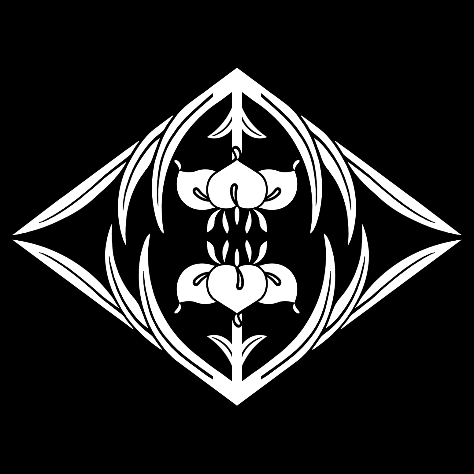 「杜若菱」紋（染抜）